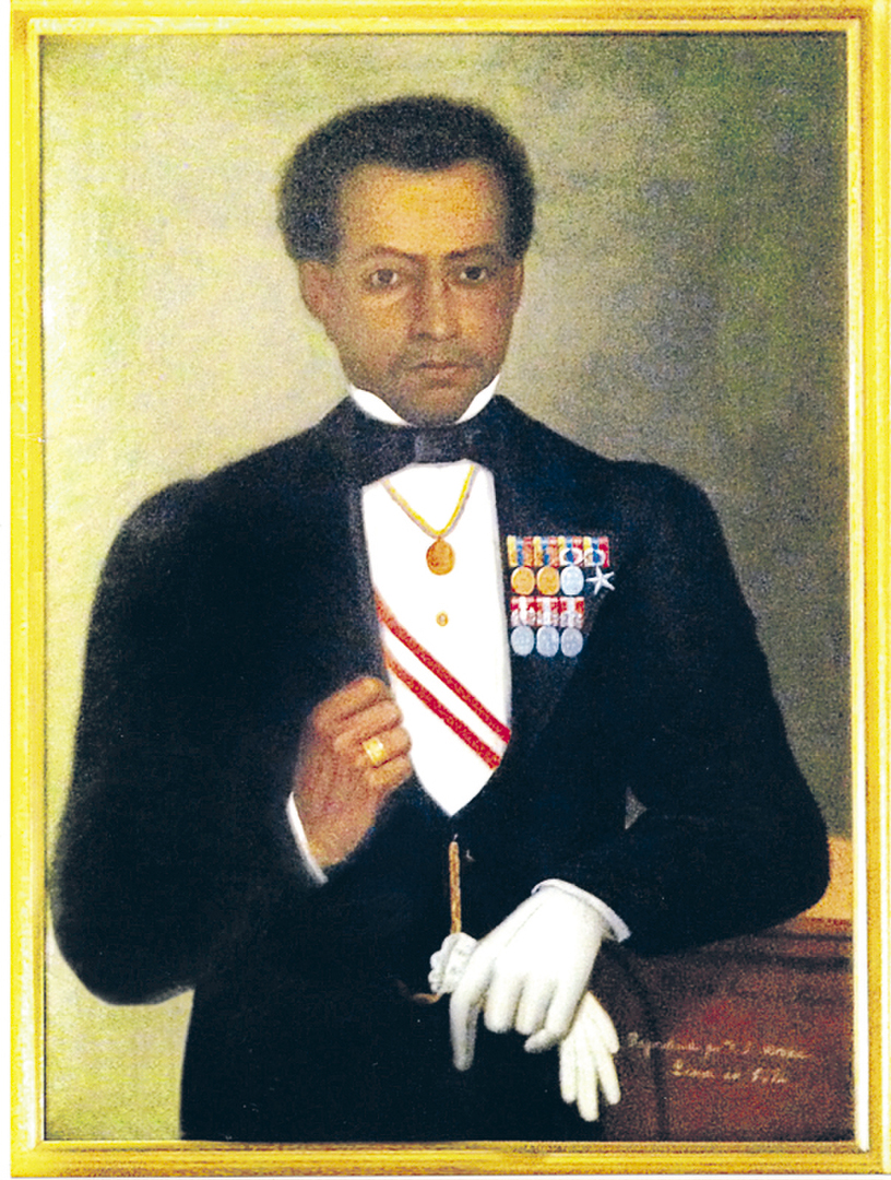 Foto de la copia restaurada del verdadero retrato de Bernardo de Monteagudo - V.S. Noroña (1876)